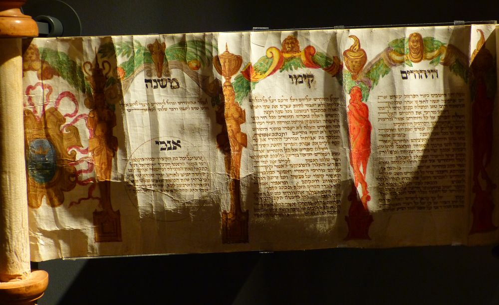 Megillah (Esther-Rolle) aus der Sammlung Braginsky